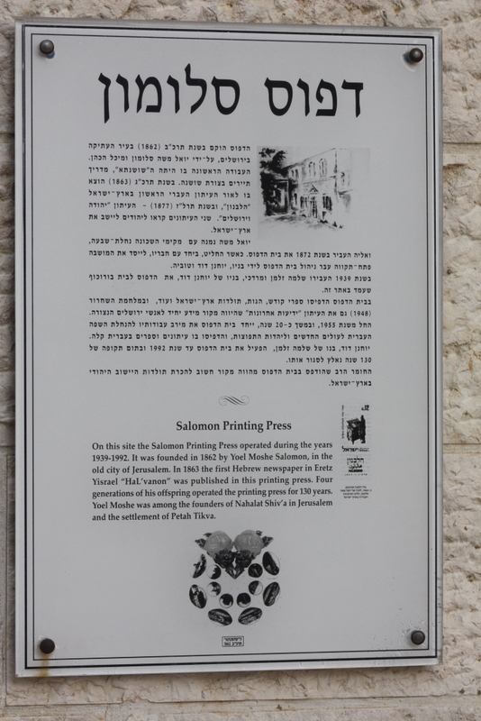 Salomon Press building in Jerusalem